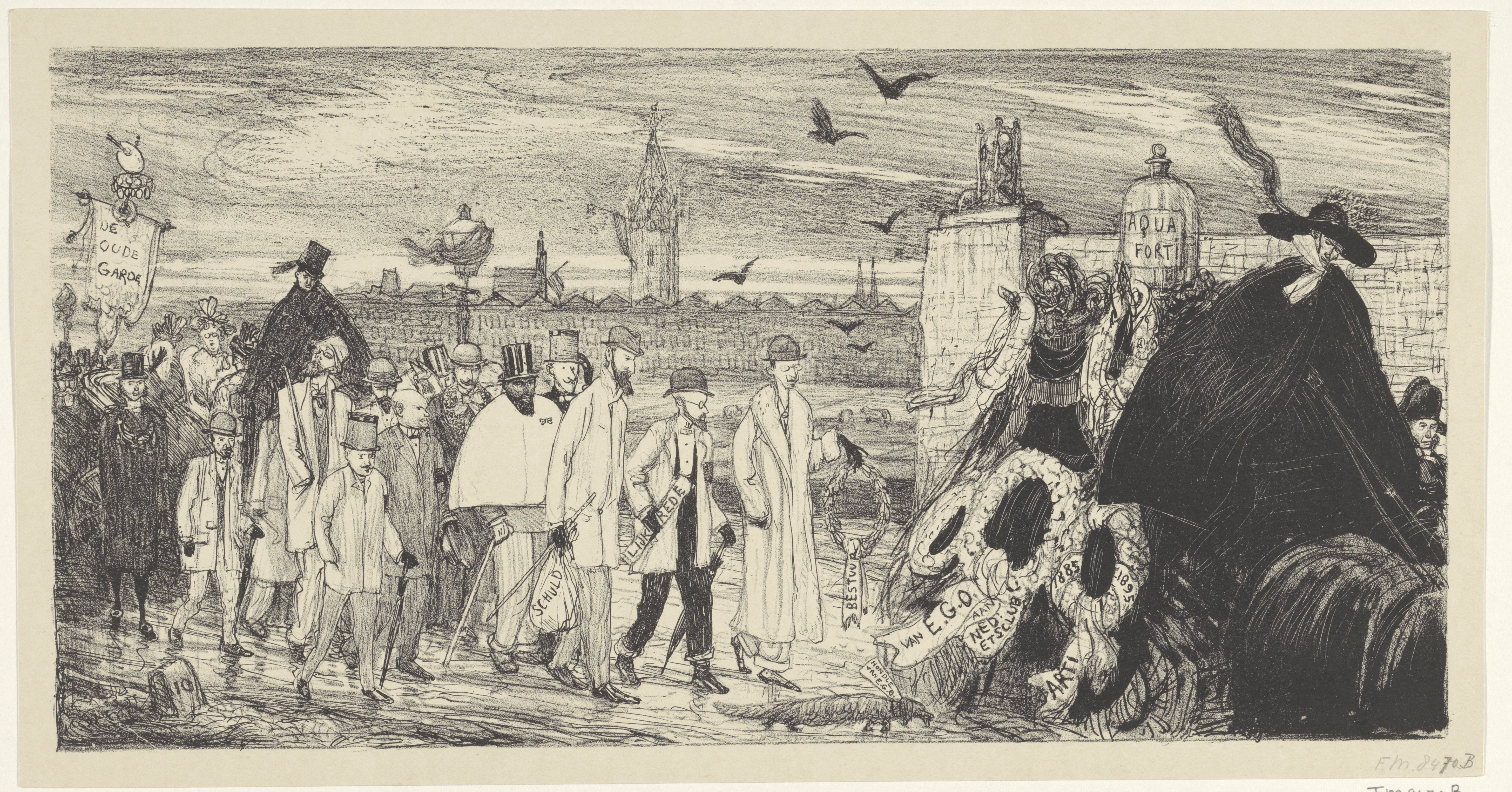 Spotprent waarin de Nederlandsche Etsclub ten grave wordt gedragen. De Etsclub hief zichzelf op op 13 januari 1896. Vooraan in de stoet de lijkwagen met rouwkransen 1885-1895, daarachter lopen de leden: Jan Veth (met bord 'lijkrede'), Philip Zilcken, Maurits van der Valk, Marinus van der Maarel, Etienne Bosch, Anton L. Koster, Hendrik J. Haverman en Jan Toorop. Marius Bauer heeft zichzelf als penningmeester van de Etsclub afgebeeld met de zak met het opschrift 'schuld'. Achter deze groep volgen de damesleden in een rijtuig: Etha Fles, Wally Moes en Thérèse Schwartze. Achteraan de stoet 'De Oude Garde'. Gepubliceerd als bijvoegsel van 'De Kroniek' van 19 januari 1896.